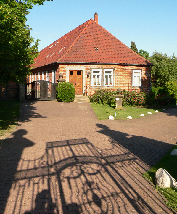 Kloster Walsrode